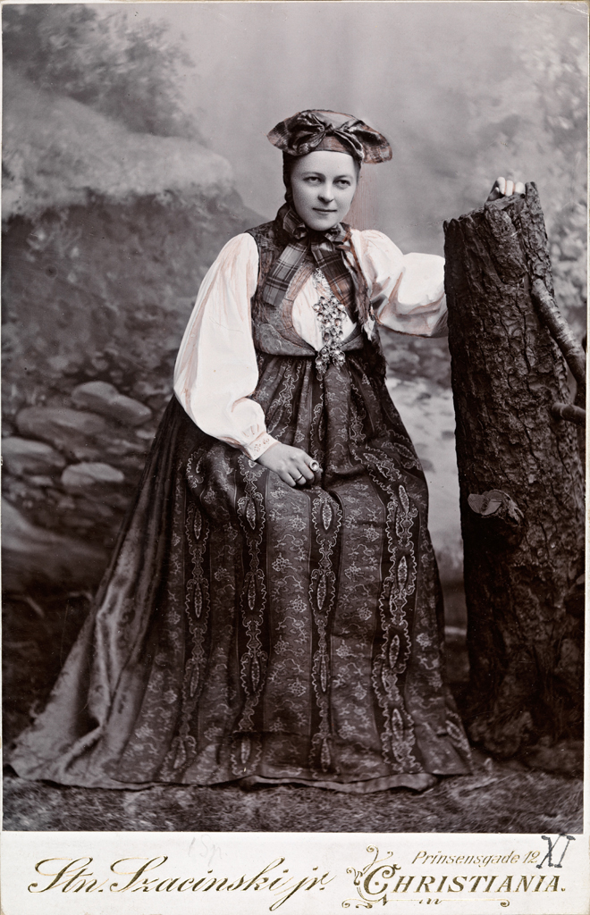 Tittel / Title: Bunad fra Eggedal Motiv / Motif: Kabinettkort. Fotografiet har tilhørt Hulda Garborg. Dato / Date: 1906 Fotograf / Photographer: Stanislaw Szacinski (1865-1931) Eier / Owner Institution: Nasjonalbiblioteket / National Library of Norway Lenke / Link: Bildesignatur / Image Number: blds_03744